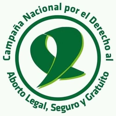 Logo de la Campaña Nacional por el Derecho al Aborto Legal, Seguro y Gratuito